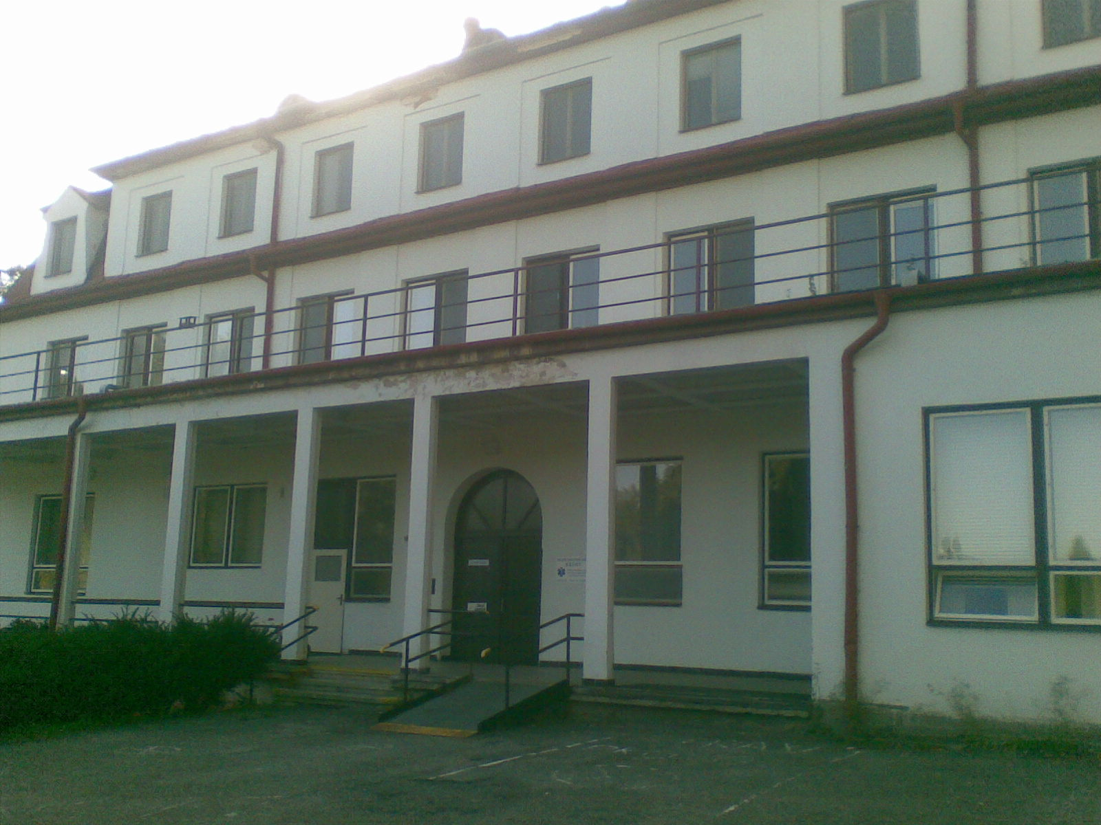 žalostný stav bývalého hotelu Waldschloss, později hotelu Ozon a pak plicní léčebny